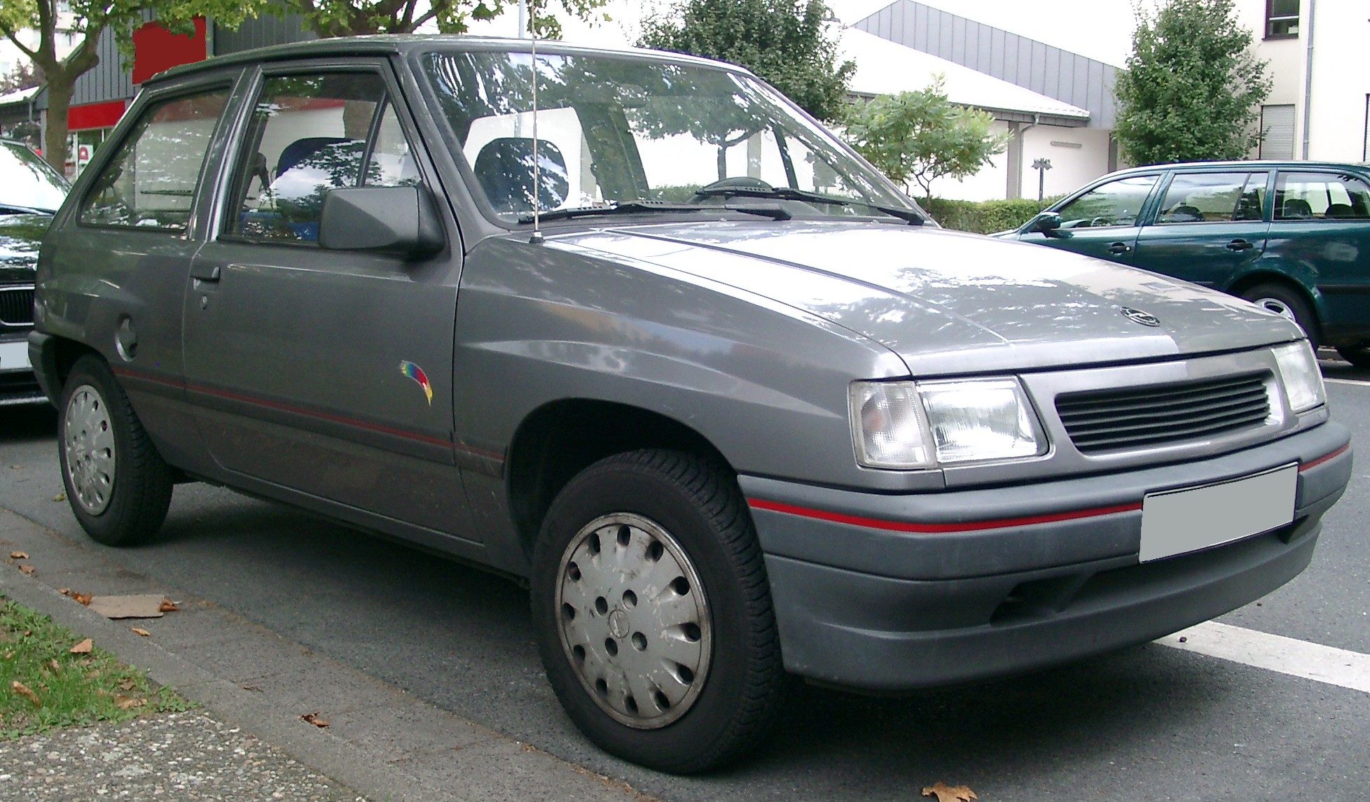 Opel Corsa A Facelift